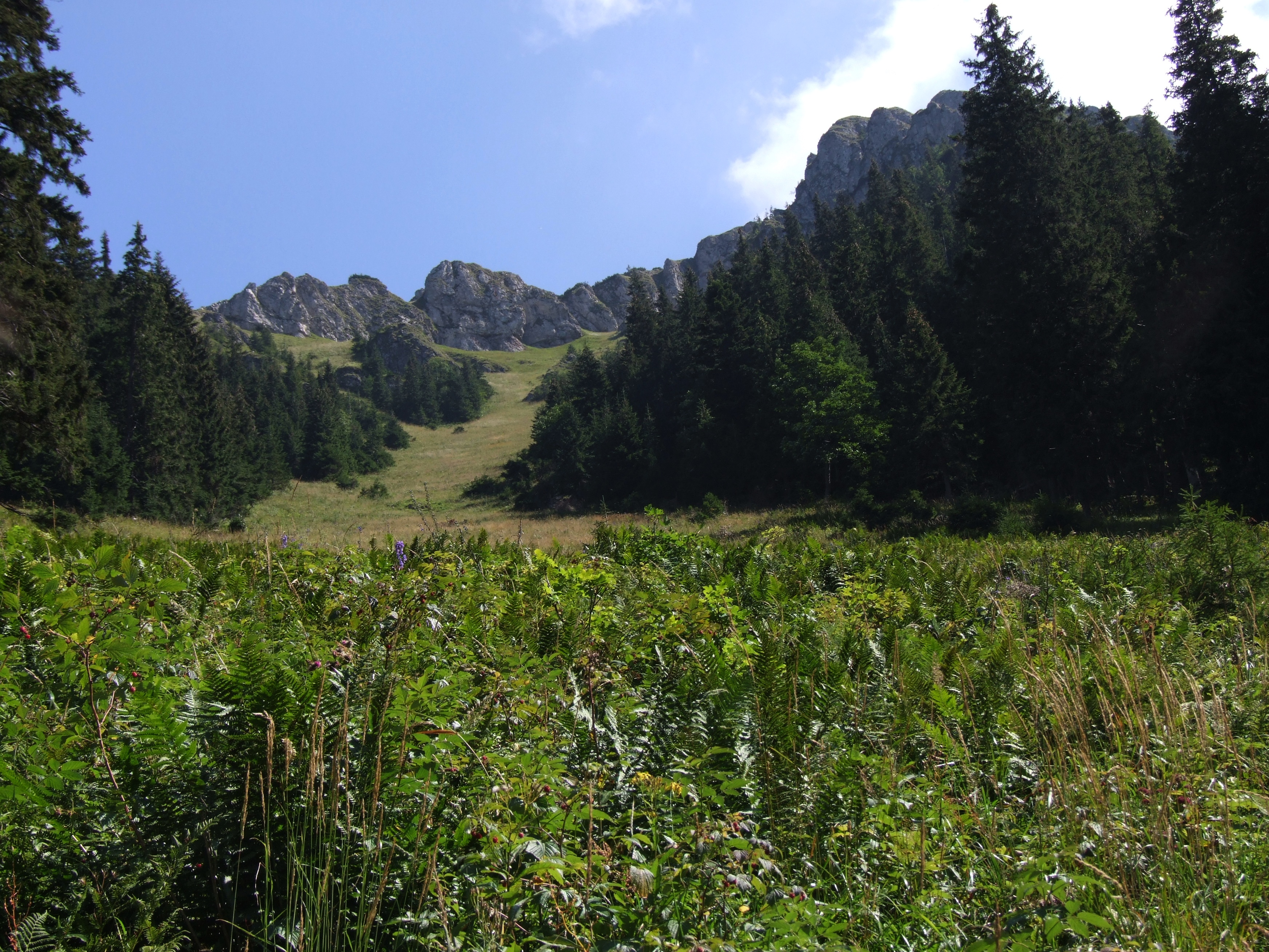 Górna część Ciepłego Żlebu